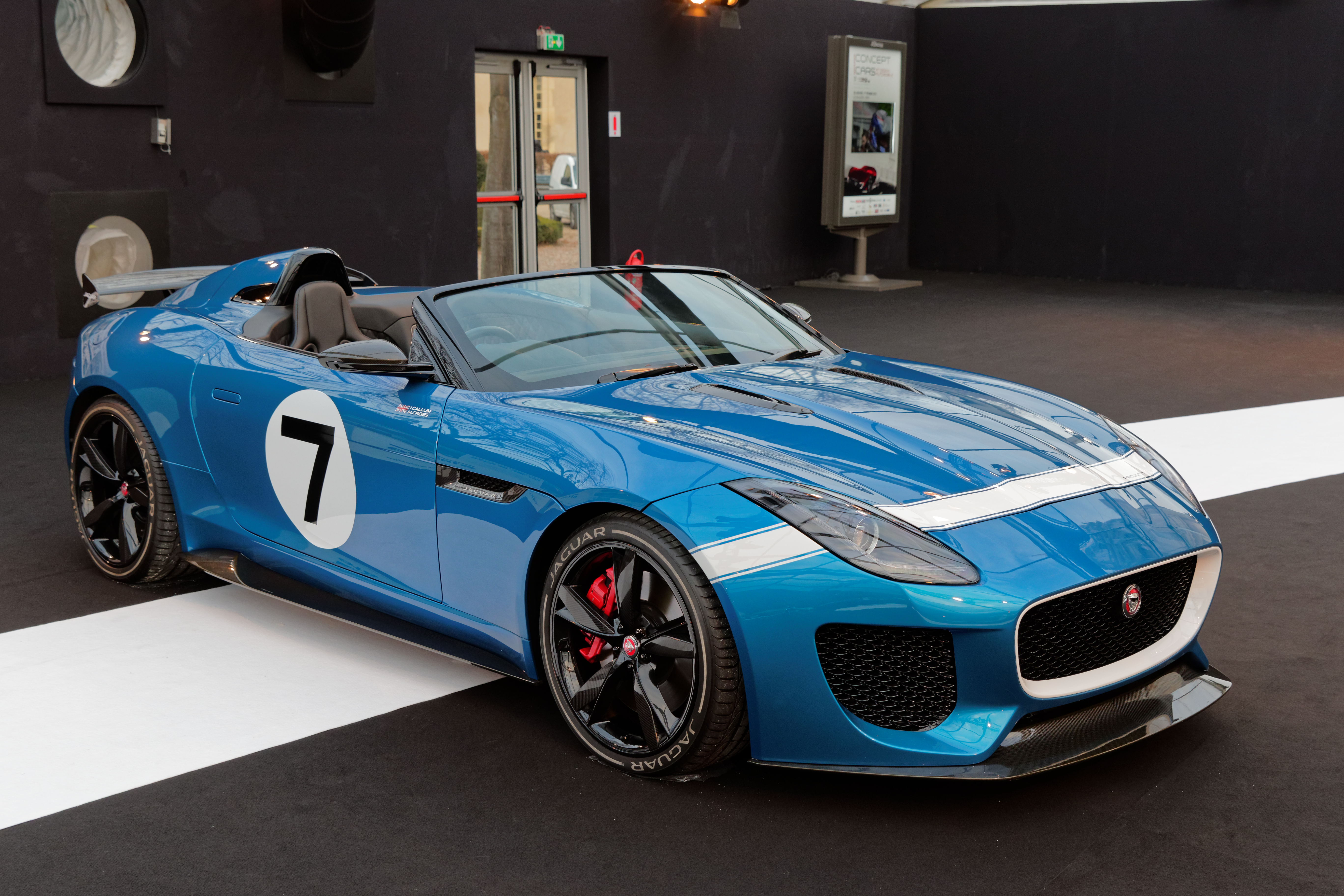 La Jaguar F-Type Project 7 exposée lors du festival automobile international 2015.